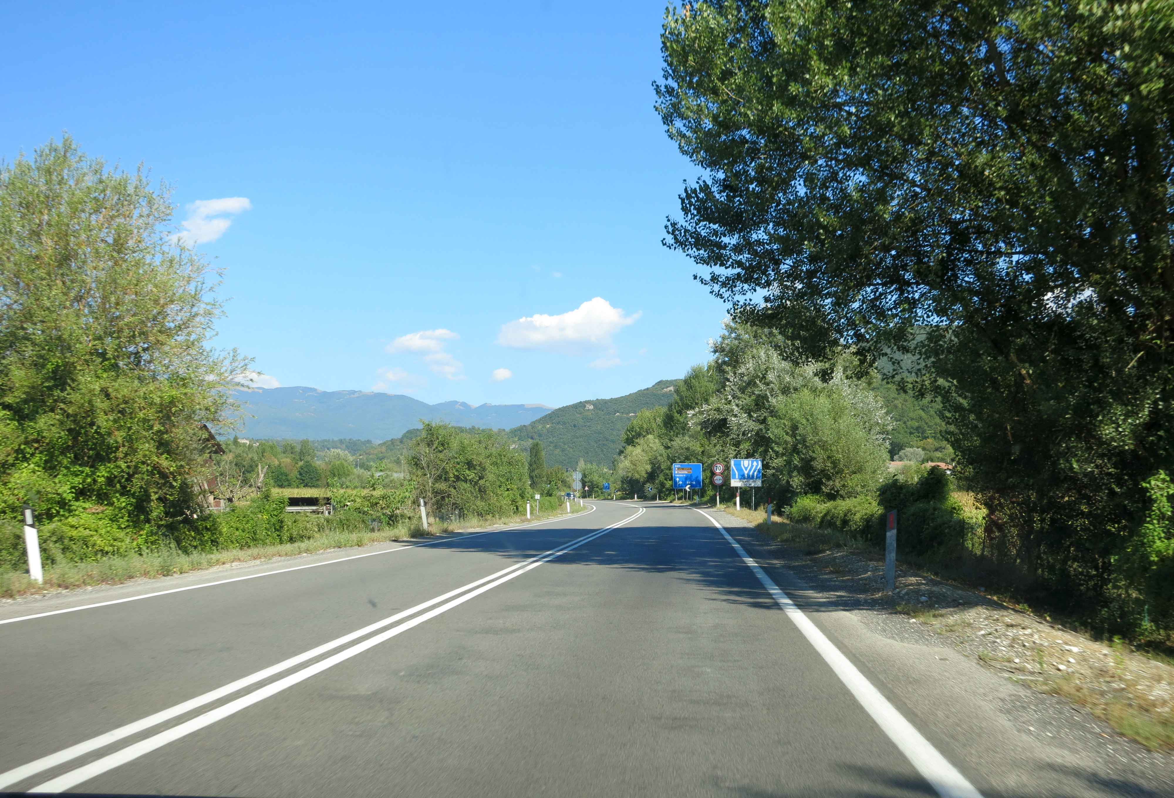 Superstrada Rieti-Terni (SS 79 Ternana) - ultimi metri in direzione Rieti, dopo lo svincolo Rieti ovest e prima dell'innesto con la SS 4 Salaria